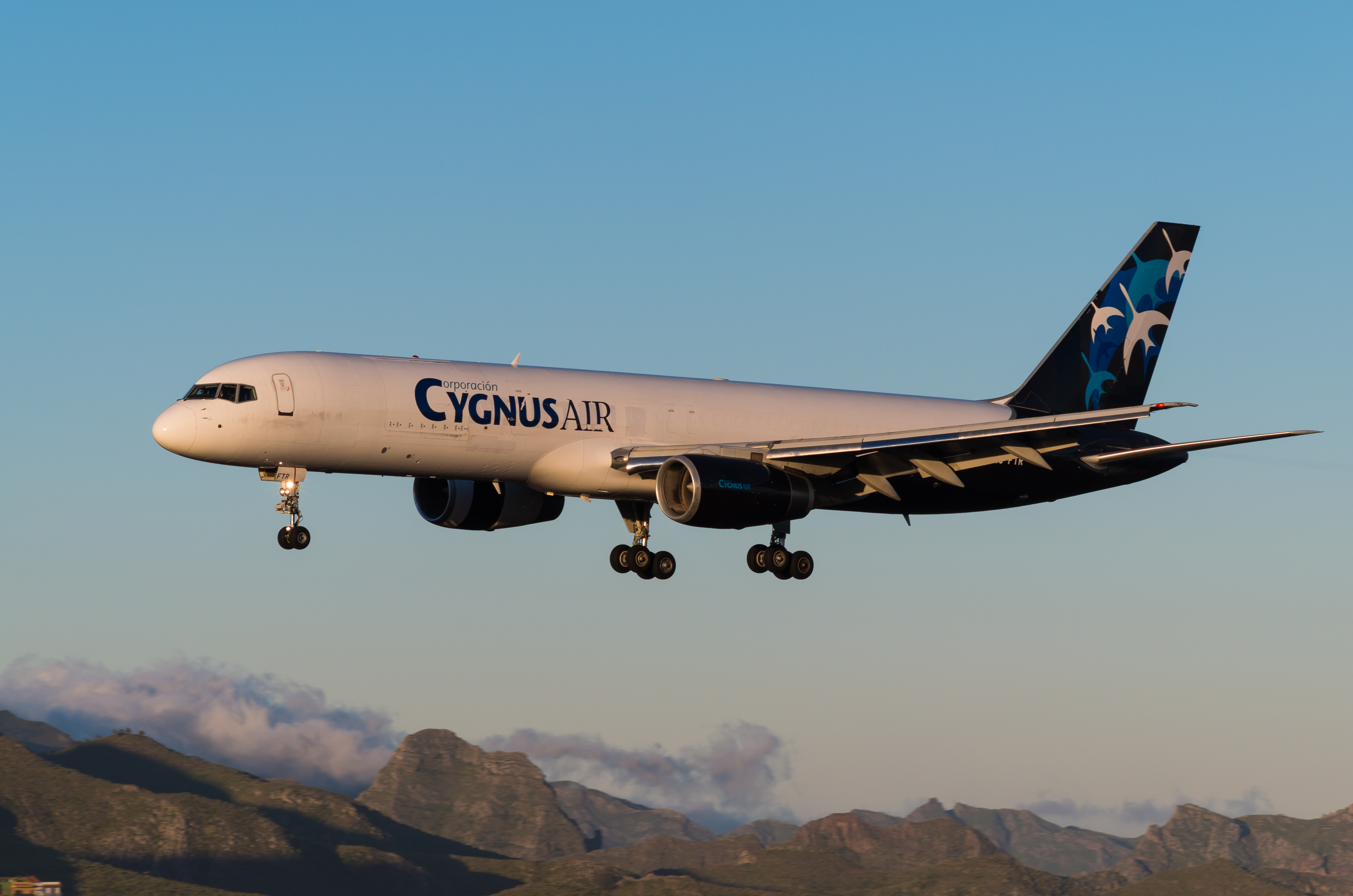 B757 Cygnus Air en fase de aproximación